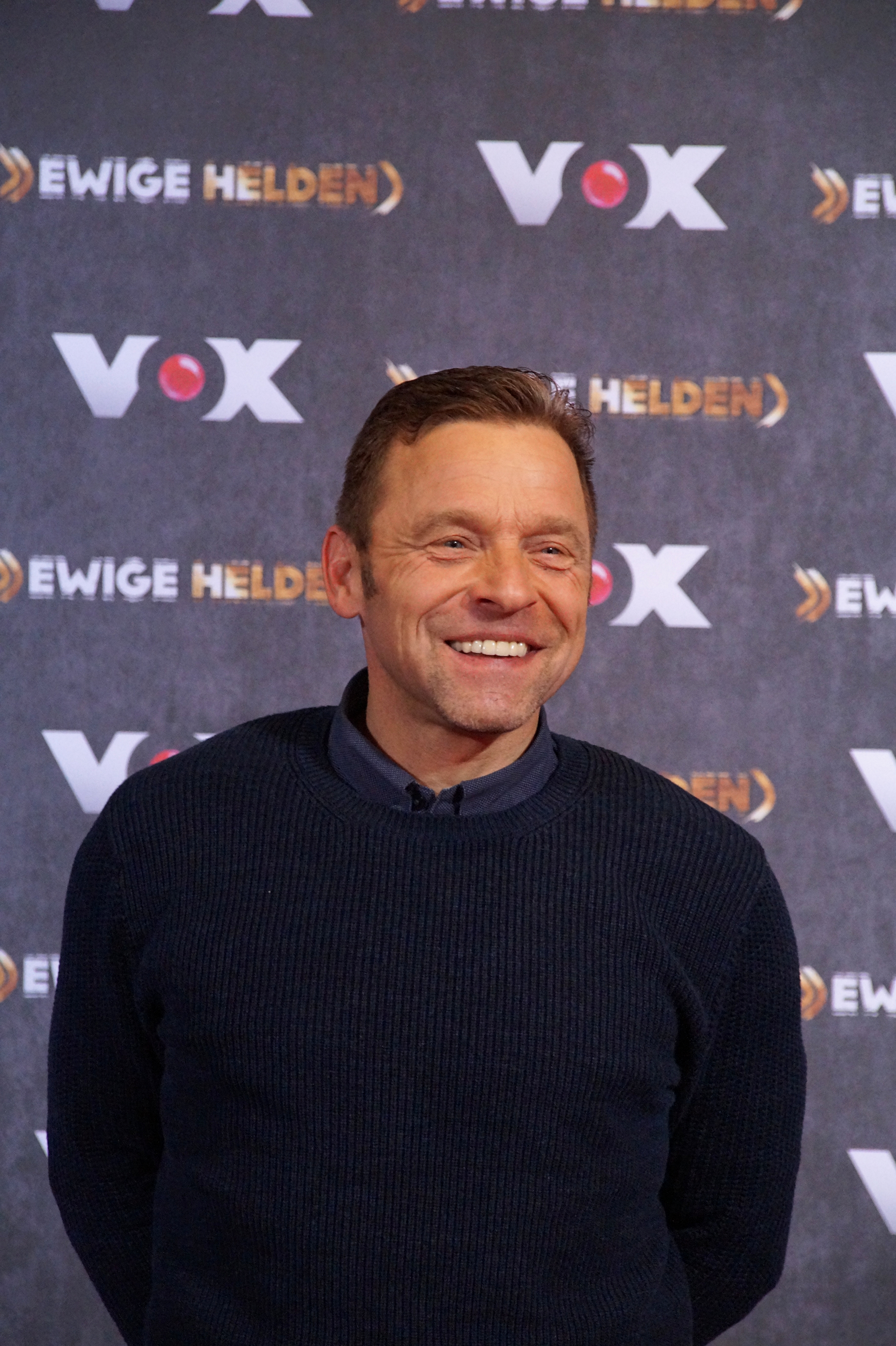 Thomas Häßler beim VOX "Ewige Helden" Pressetermin, im Dezember 2015.